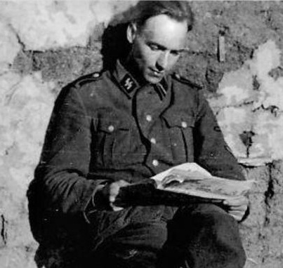 SS-Rottenführer Per Pedersen Tjøstland